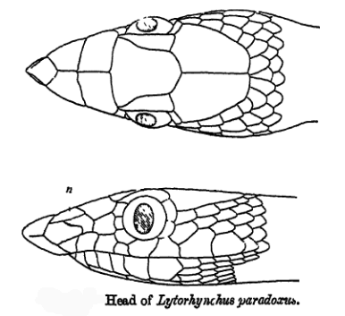 Lytorhynchus paradoxus